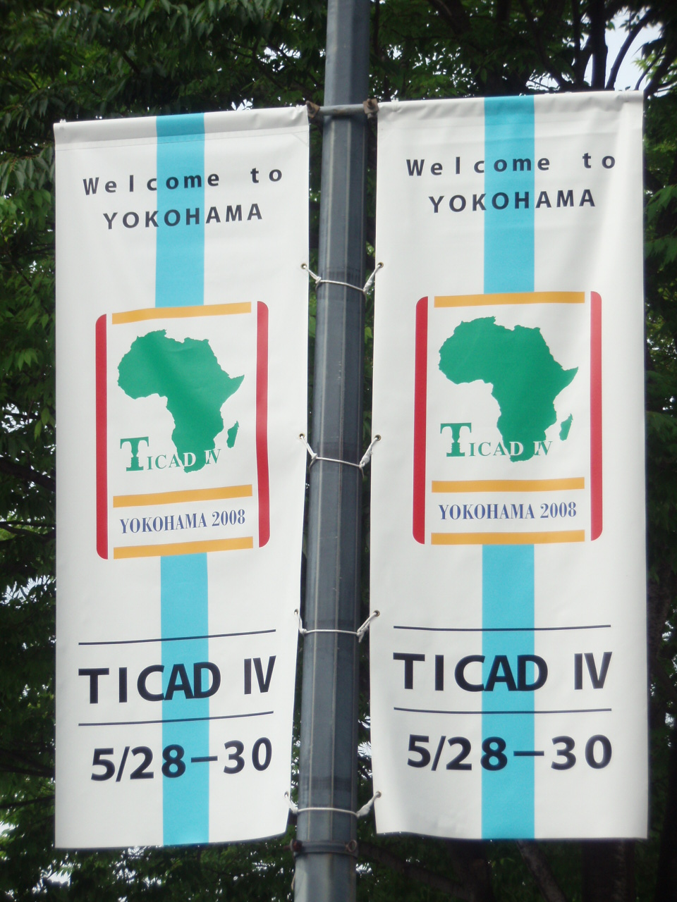 TICAD 4, Ampliation Banner (yokohama Japan)